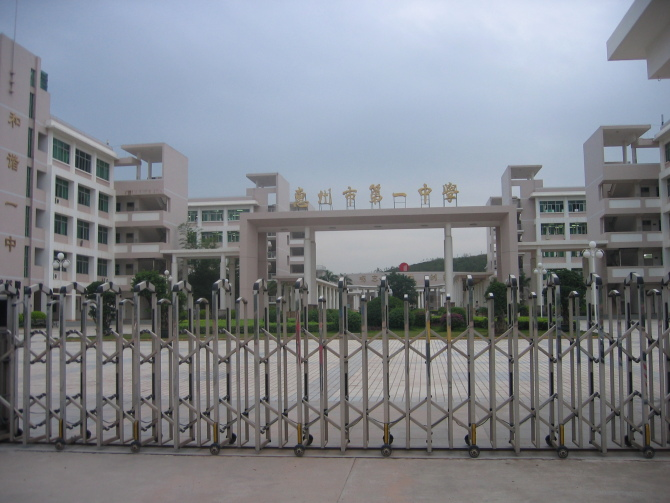 惠州市第一中学东江学府校区（高中部）